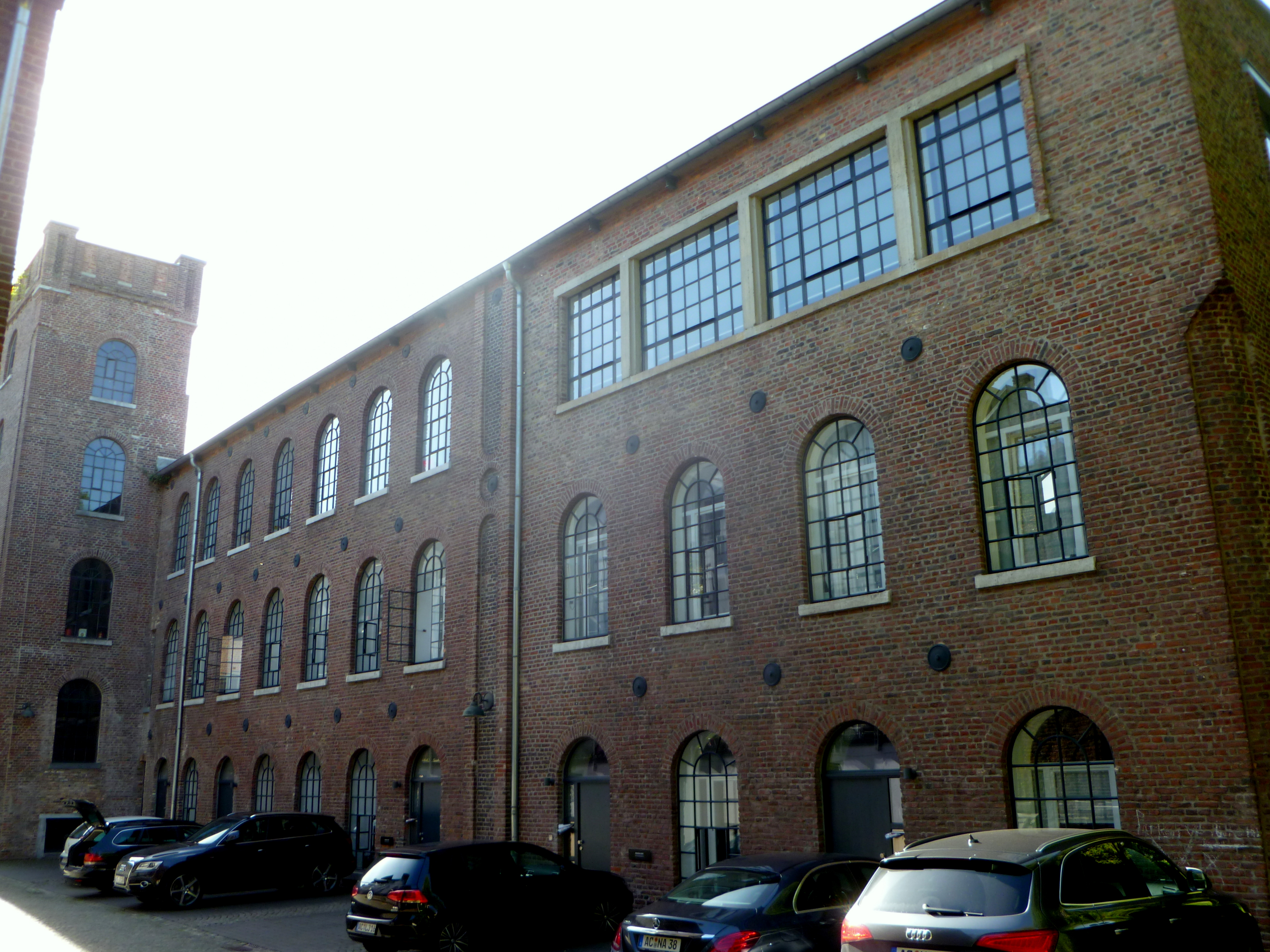 ehem. Tuchfabrik Pastor in der Augustastraße in Aachen, später Tuchfabrik Neuwerk GmbH; Baudenkmal